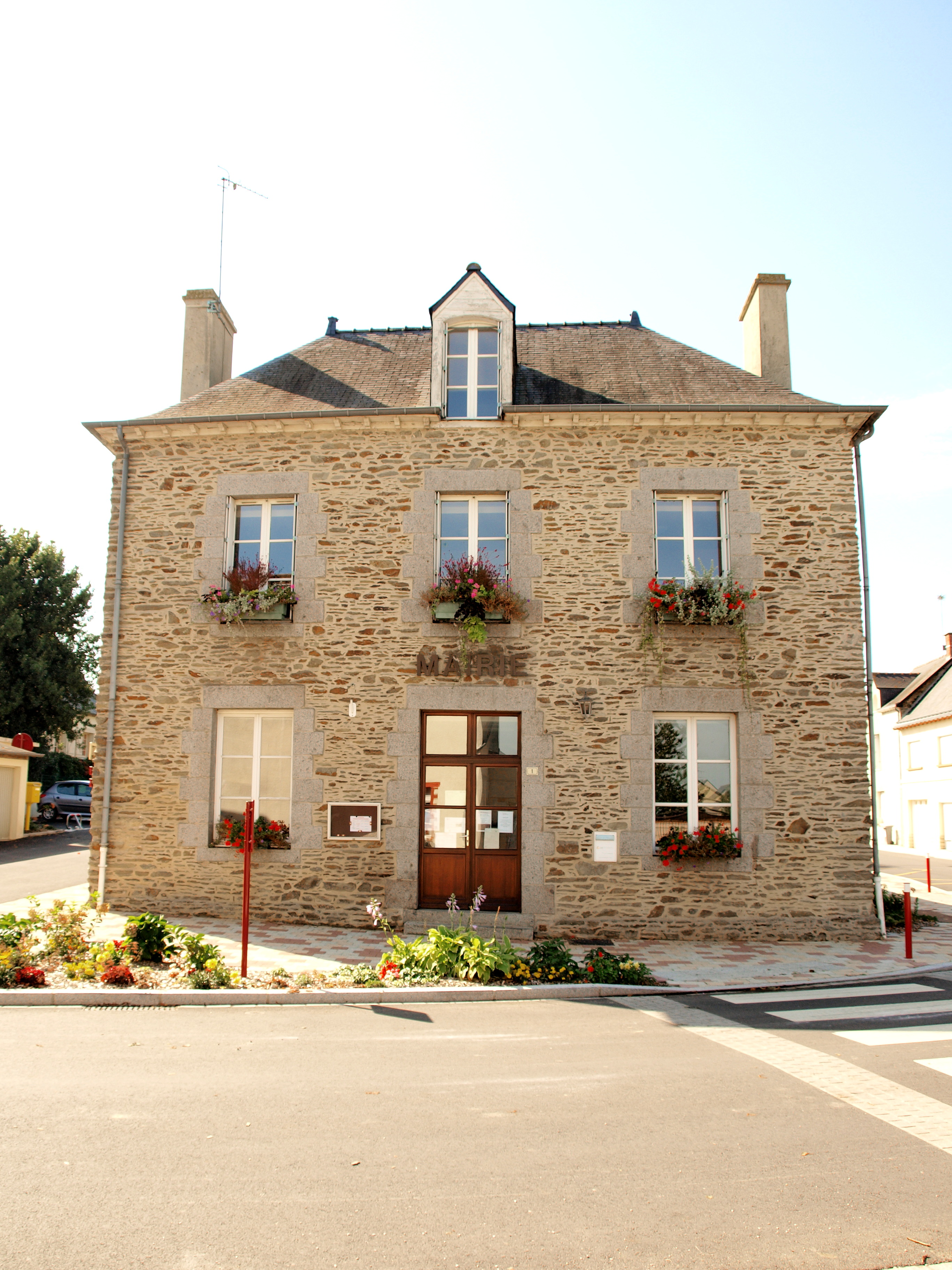 Cornillé (Ille-et-Vilaine ; France) mairie